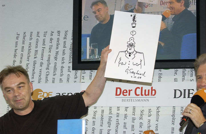 Gerhard Seyfried auf dem Blauen Sofa während der Frankfurter Buchmesse 2004.